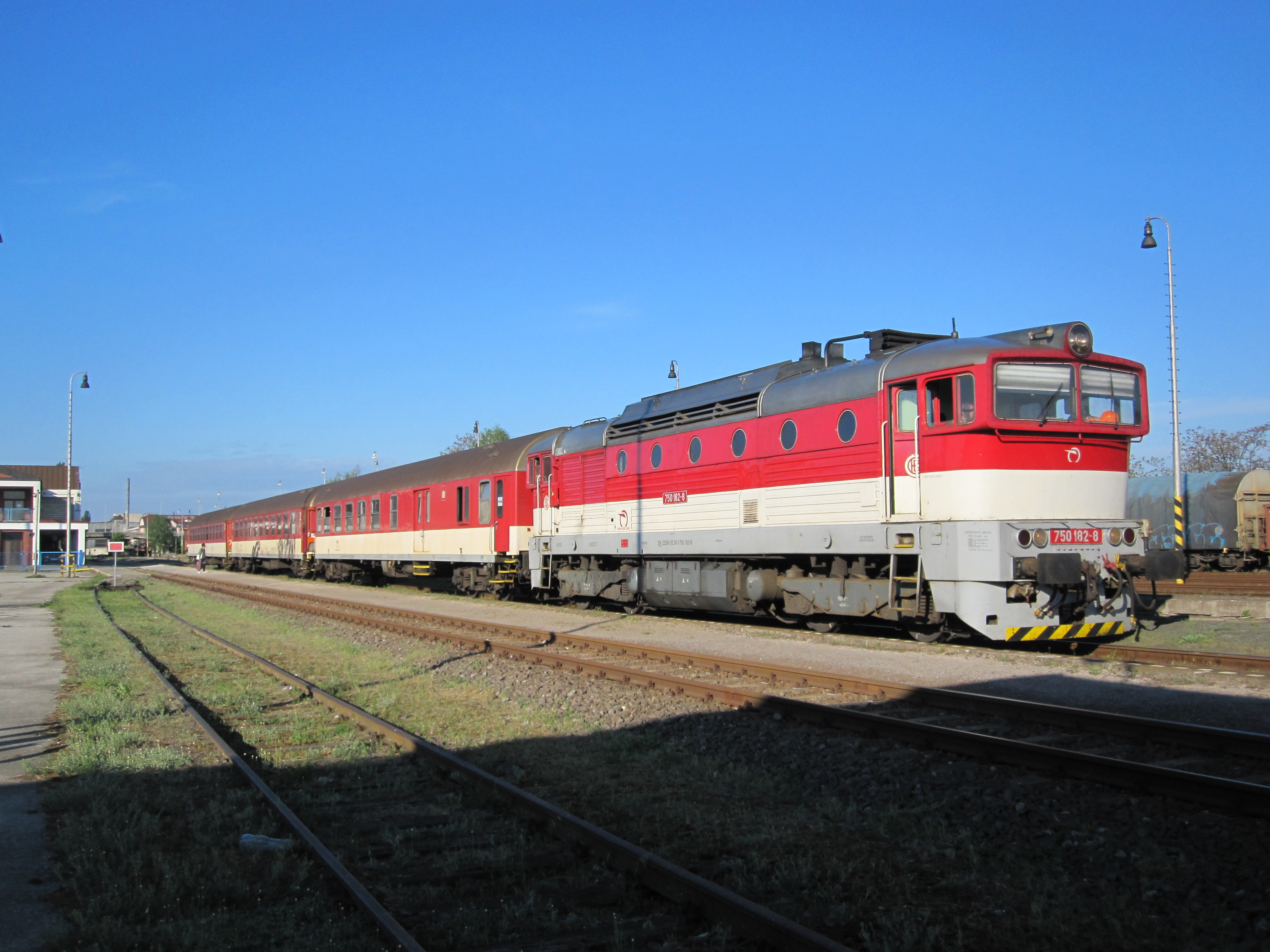 Vlak Železniční společnosti Slovensko s motorovou lokomotivou 750.182, Topoľčany